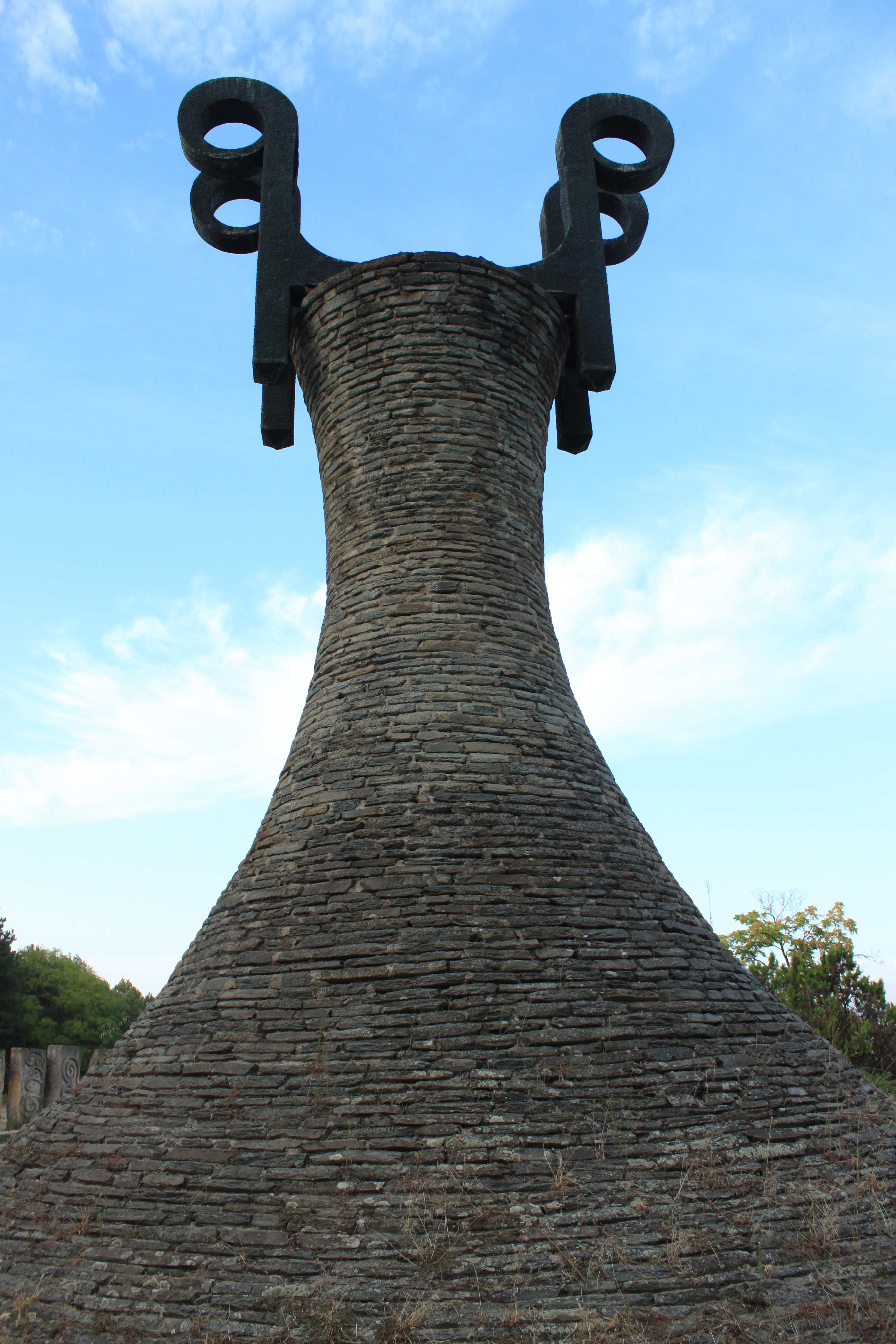 Spomen park Leskovac